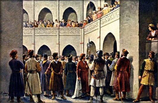 Josef Mathauser - Vladislav III. zvolen knížetem roku 1197